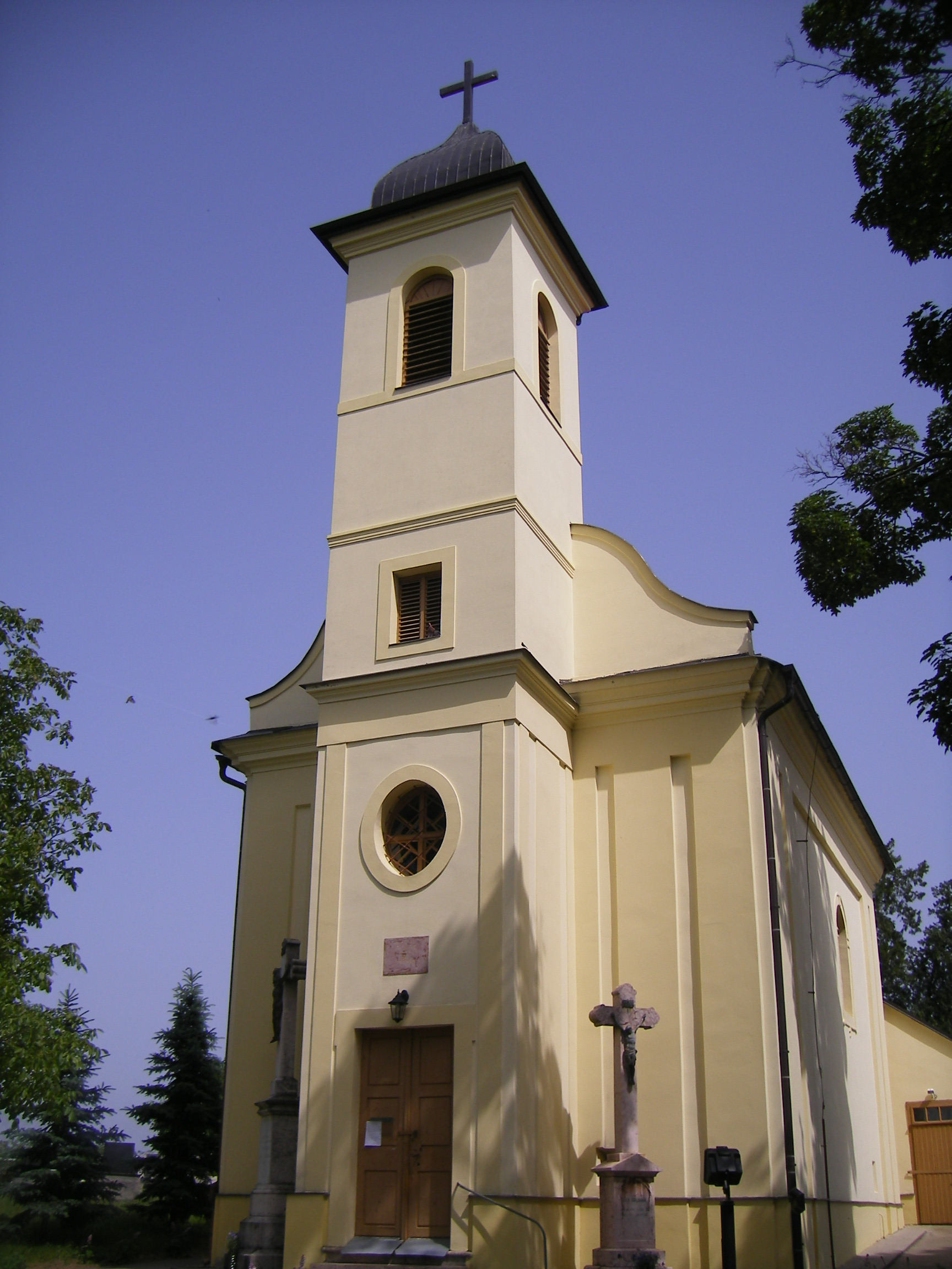 Bagota - Szent Anna katolikus templom